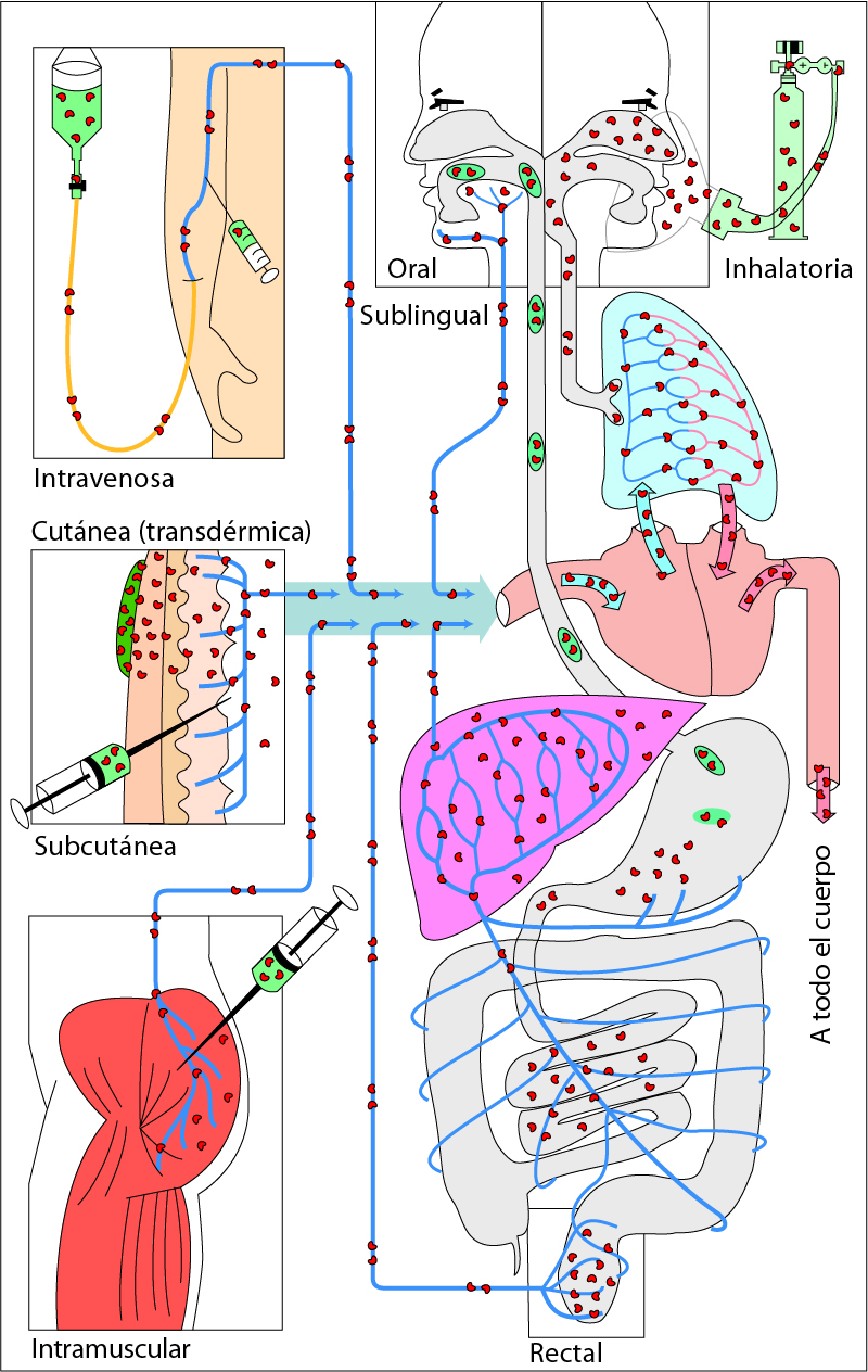 Este esquema describe las principales vías de administración de fármacos en el cuerpo humano.